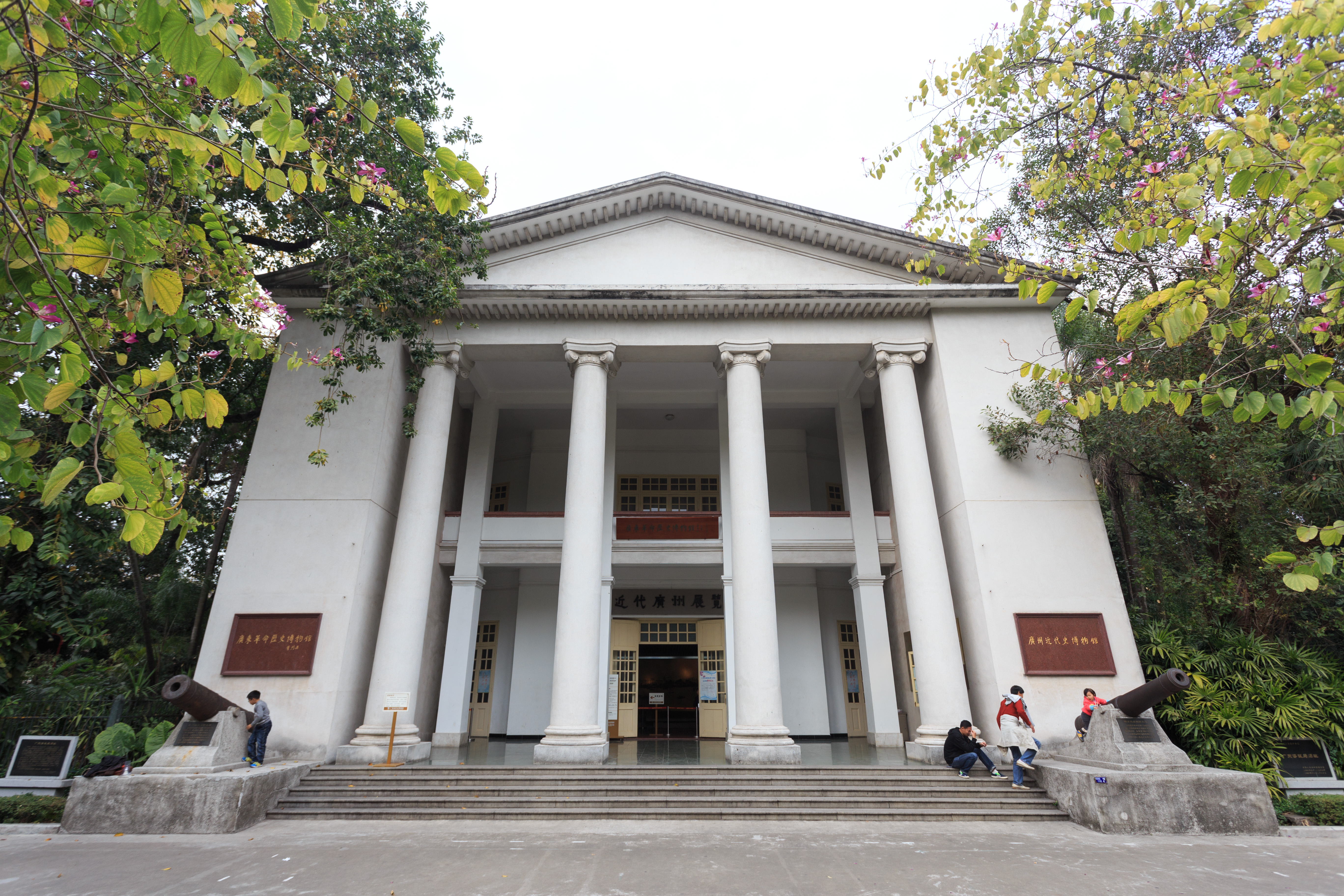 广州广东咨议局旧址（广东革命历史博物馆、广州近代史博物馆）